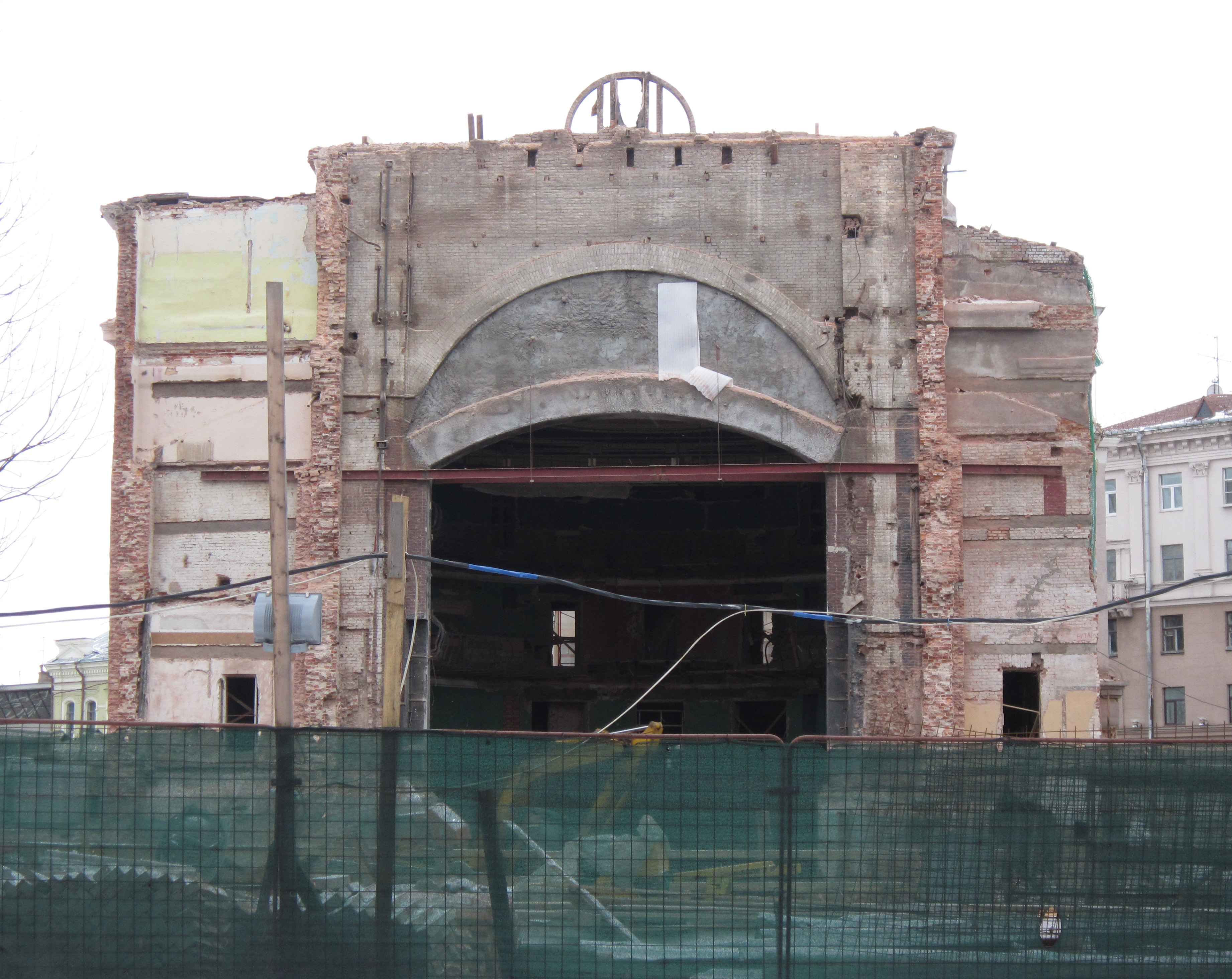 Реконструкция Купаловского театра в Минске. Вид сзади.